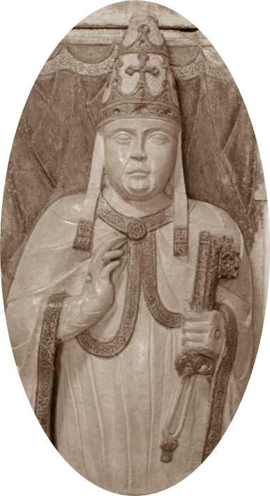 Papst Benedikt XII., zeitgenössische Darstellung, Unterkirche Petersdom, Rom